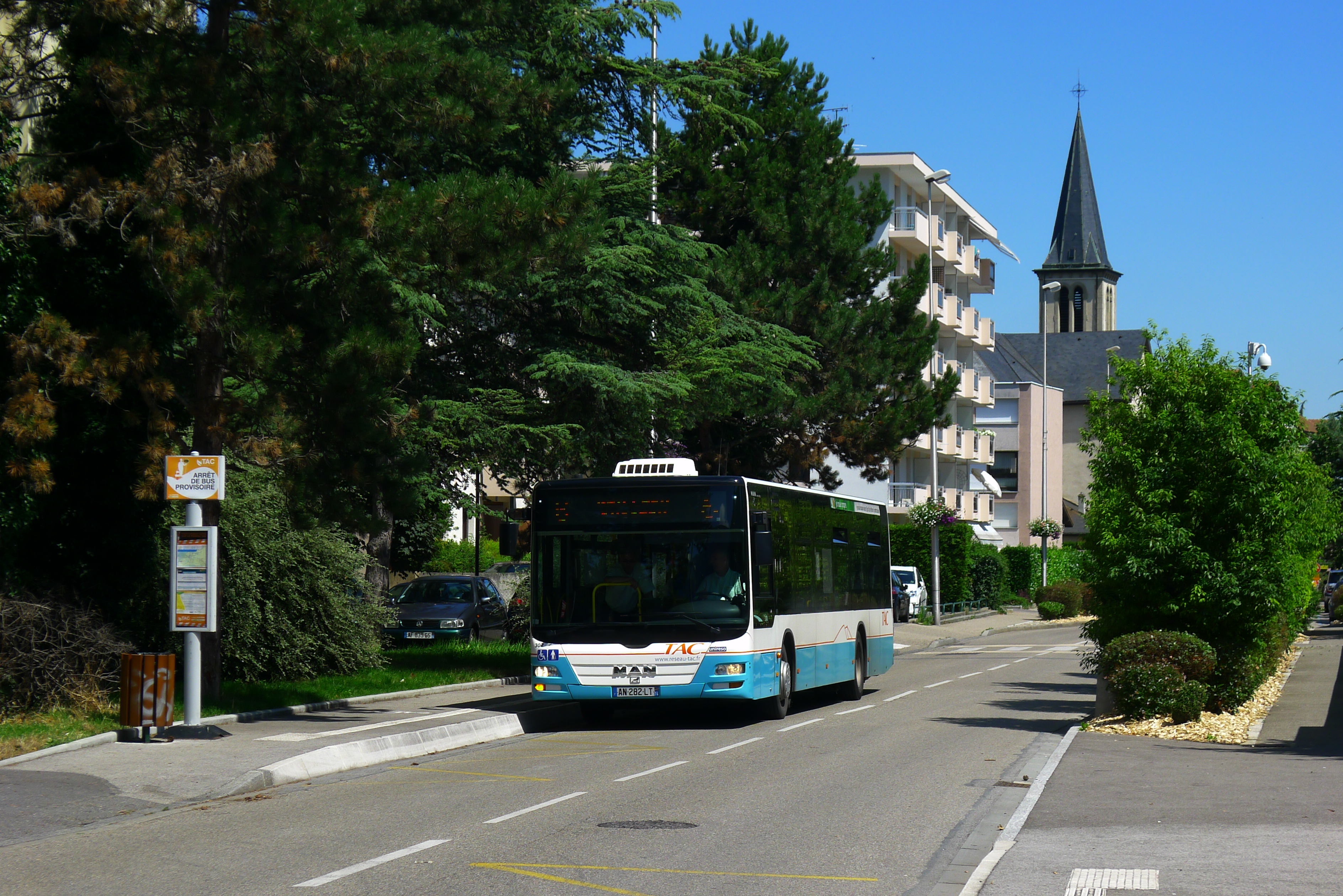 Autobus Man Lion's City n°302 du réseau TAC (Annemasse) sur la ligne 6 en direction de Gaillard-Fossard, vu près de l'Eglise de Gaillard.